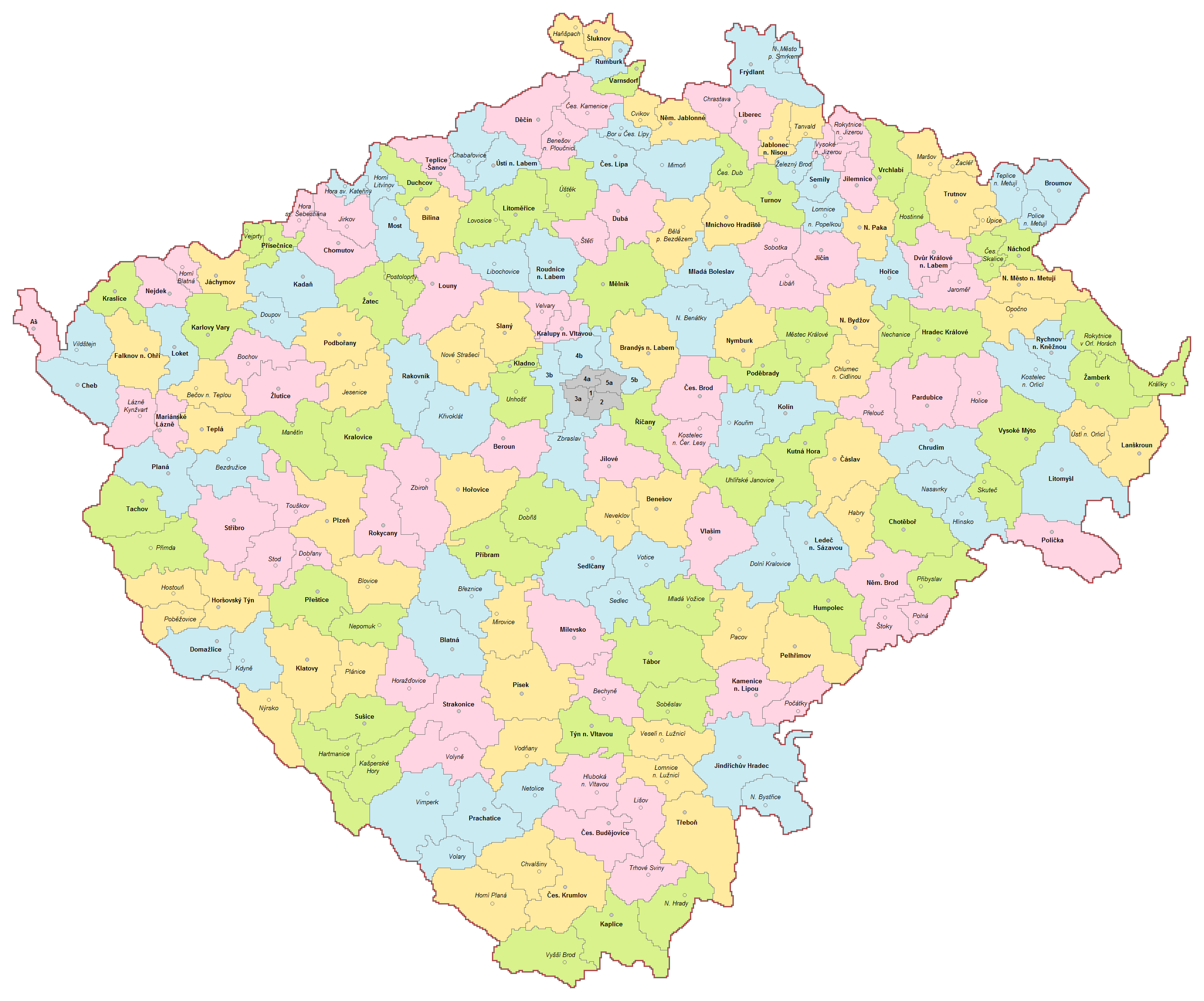 Správní rozdělení země České na politické a soudní okresy v roce 1938 Každý politický okres zahrnuje jeden či více okresů soudních (v sídle politického okresu je vždy i sídlo okresního soudu). Zvláštní výjimkou je Praha, která jako hlavní město obsahuje celé soudní okresy Vnitřní Praha (1) a Praha-jih (2) a části soudních okresů Praha-východ (3a), Praha-sever (4a) a Praha-západ (5a), jejich zbývající části (3b, 4b a 5b) tvoří spolu se soudním okresem Zbraslav politický okres Praha-venkov.